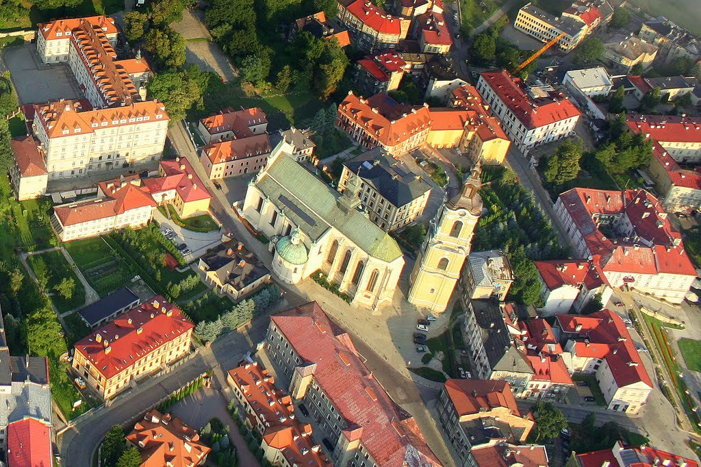 Przemyśl, Bazylika